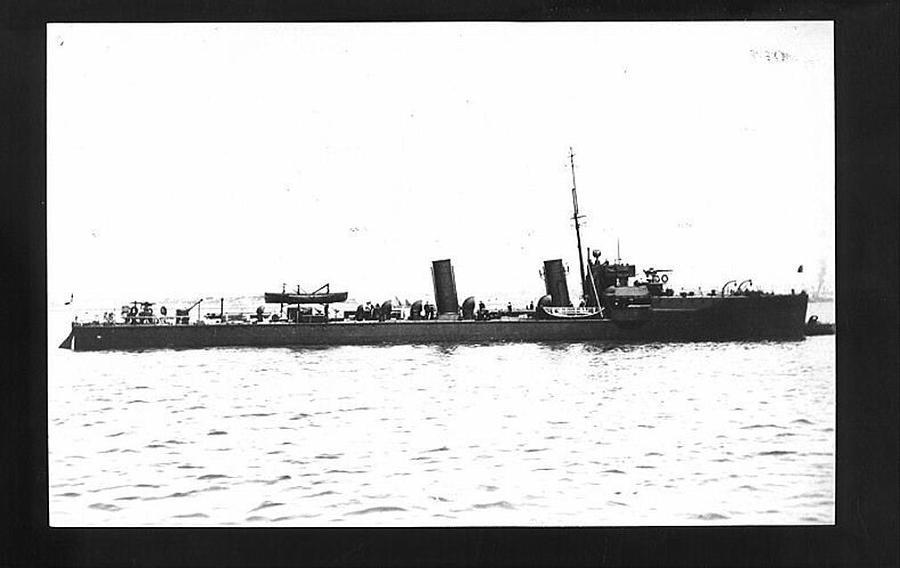 Der britische Zerstörer Kennet